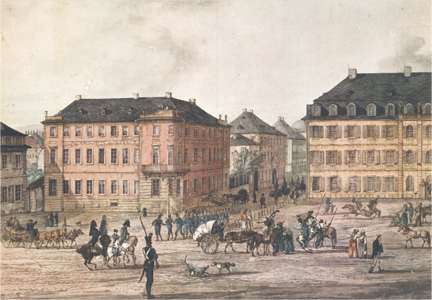 Der Luisenplatz in Darmstadt zur Zeit der Freiheitskriege, Gemälde im Hessischen Landesmuseum Darmstadt. Das Gebäude angeschnitten links die spätere Hauptpost, das rote Gebäude links das gerade erbaute Alexanderpalais noch ohne spätere Verlängerung, rechts das Kanzleigebäude.